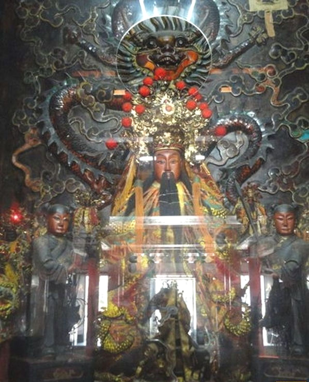 雲林縣褒忠鄉馬鳴村泰安5之1號－褒忠泰安宮。